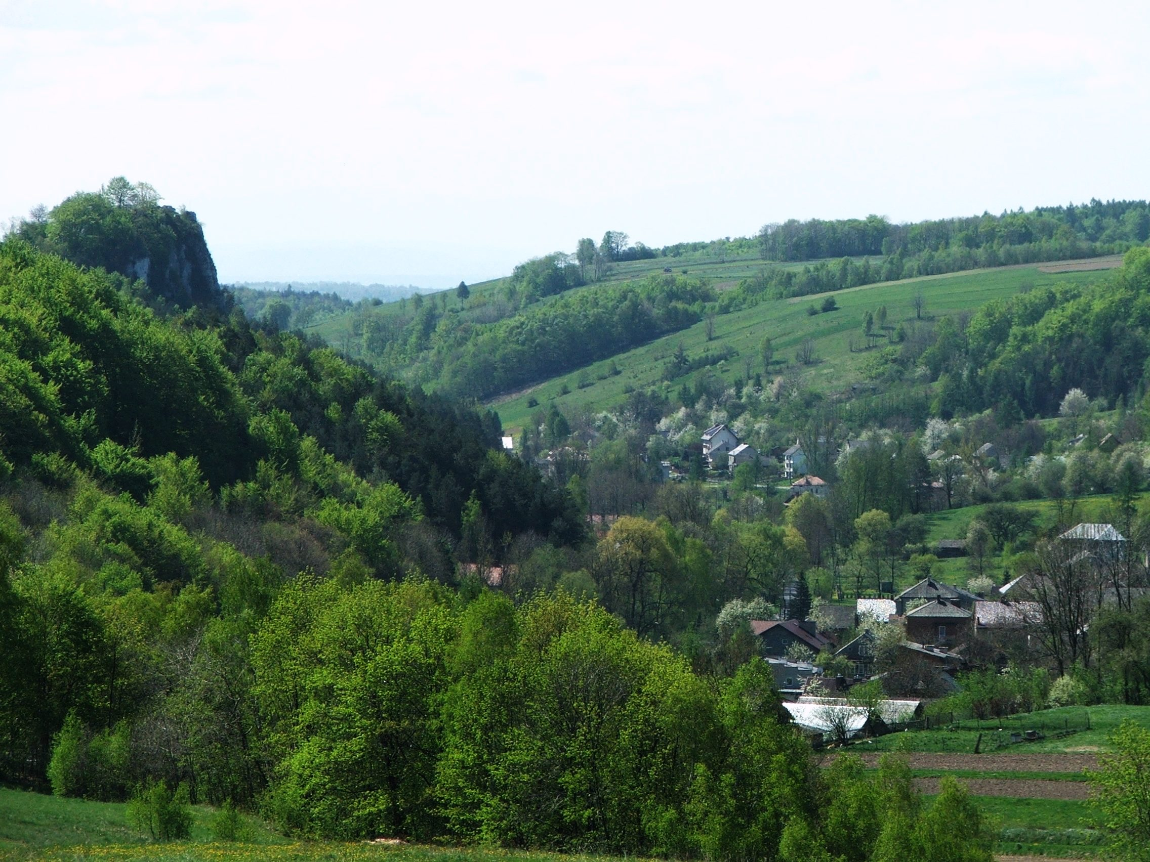 Szklarki (województwo małopolskie)